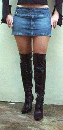 Miniskirt